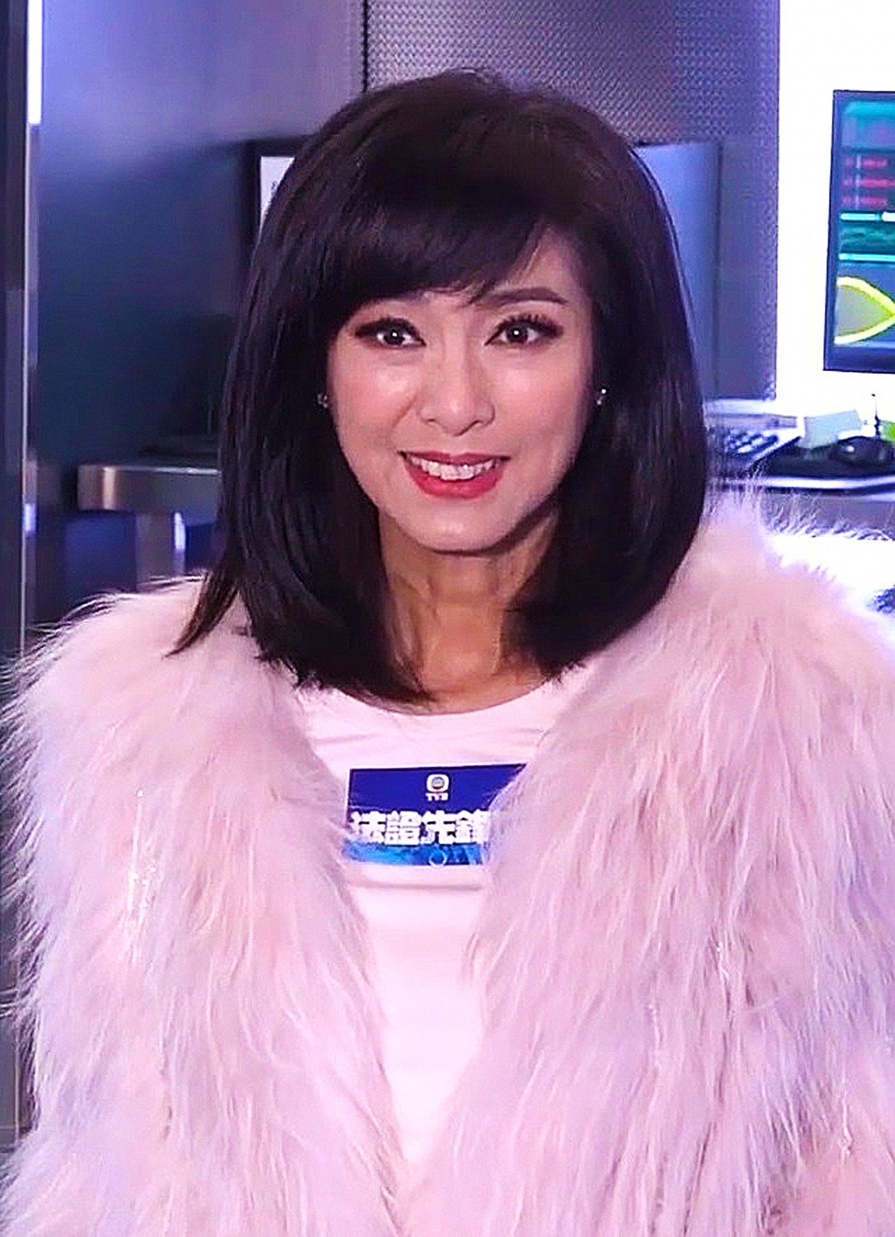 中文（香港）: 《2008年萬千星輝頒獎典禮》「最佳女主角」及《亞洲電視大獎頒獎禮2009》「最佳女主角」